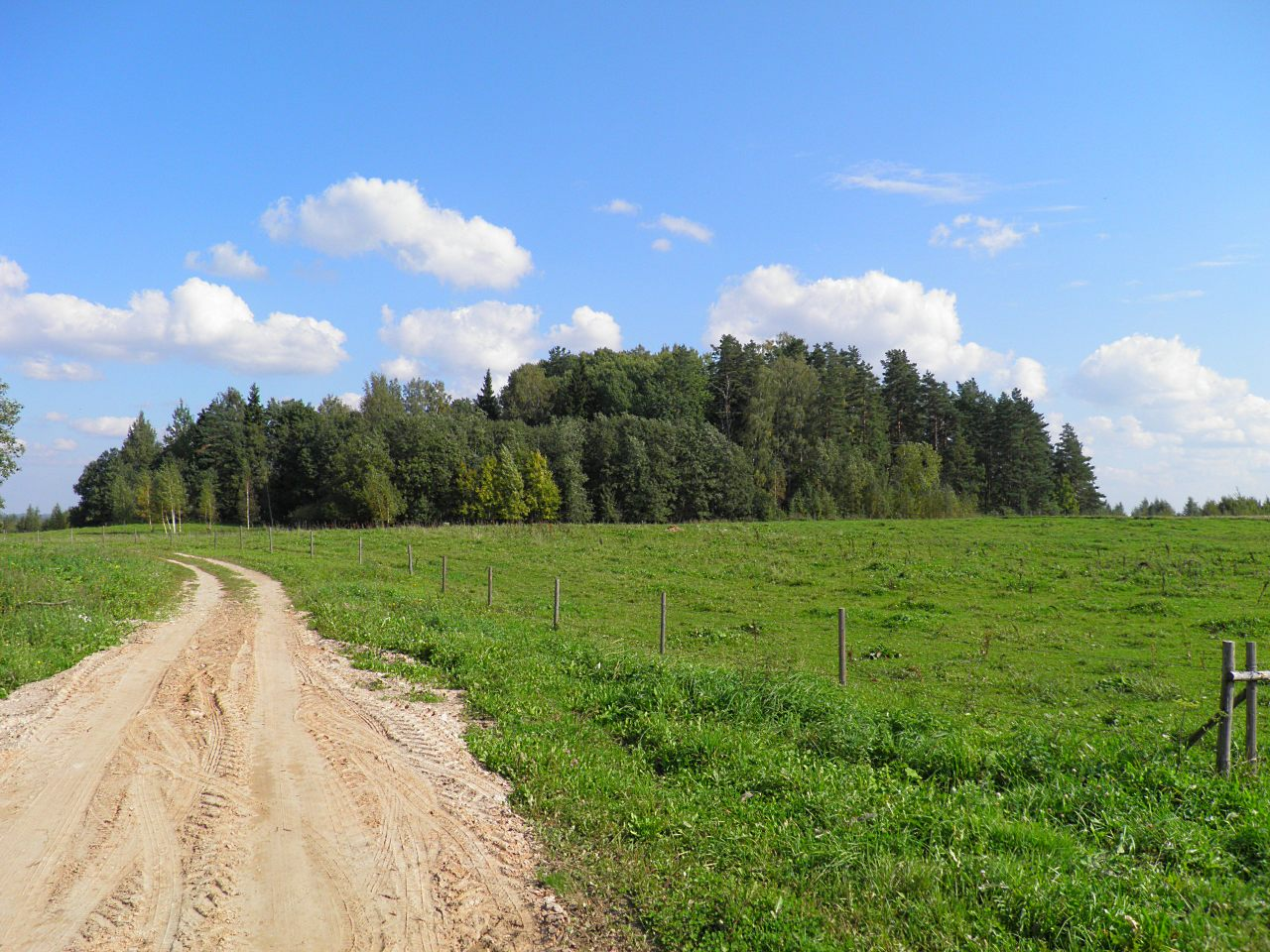 Zilais kalns